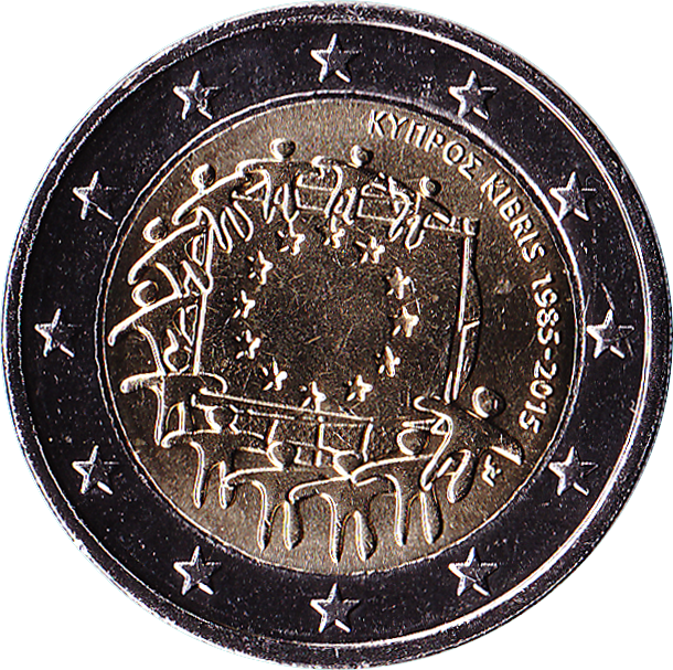 2 Euro Chypre 2015 - 30e anniversaire du drapeau européen